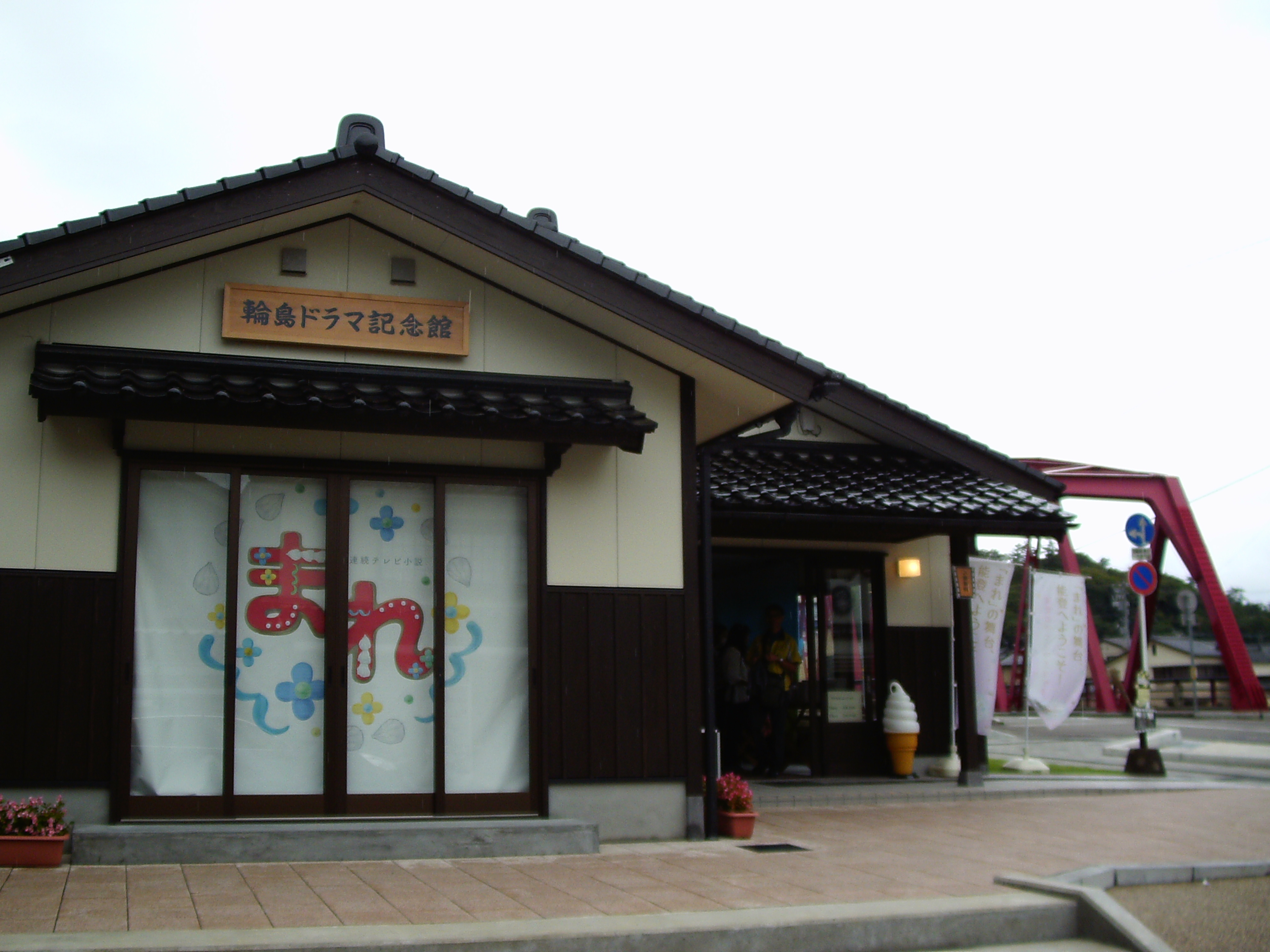 NHK朝の連続テレビドラマ『まれ』の舞台となったことを記念し建てられた施設 背後にロケ地となった「いろは橋」